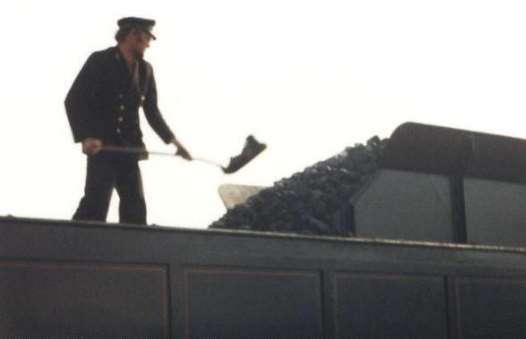 Fyrbøder på DSB P917's tender